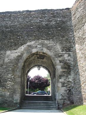 Vista da porta da muralla romana de Lugo que comunica a Praza do Ferrol coa ronda. Imaxe tomada o 22 de xullo de 2005 (22-07-2005).